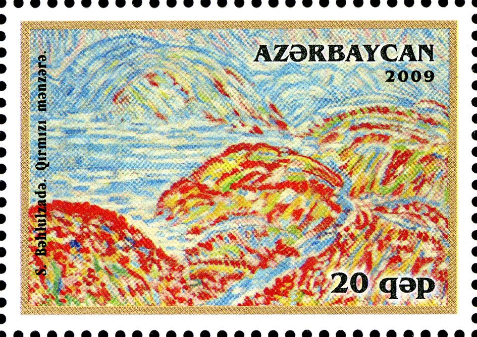 Azerbaijan Art School - Sattar Bakhlulzadeh - Red View